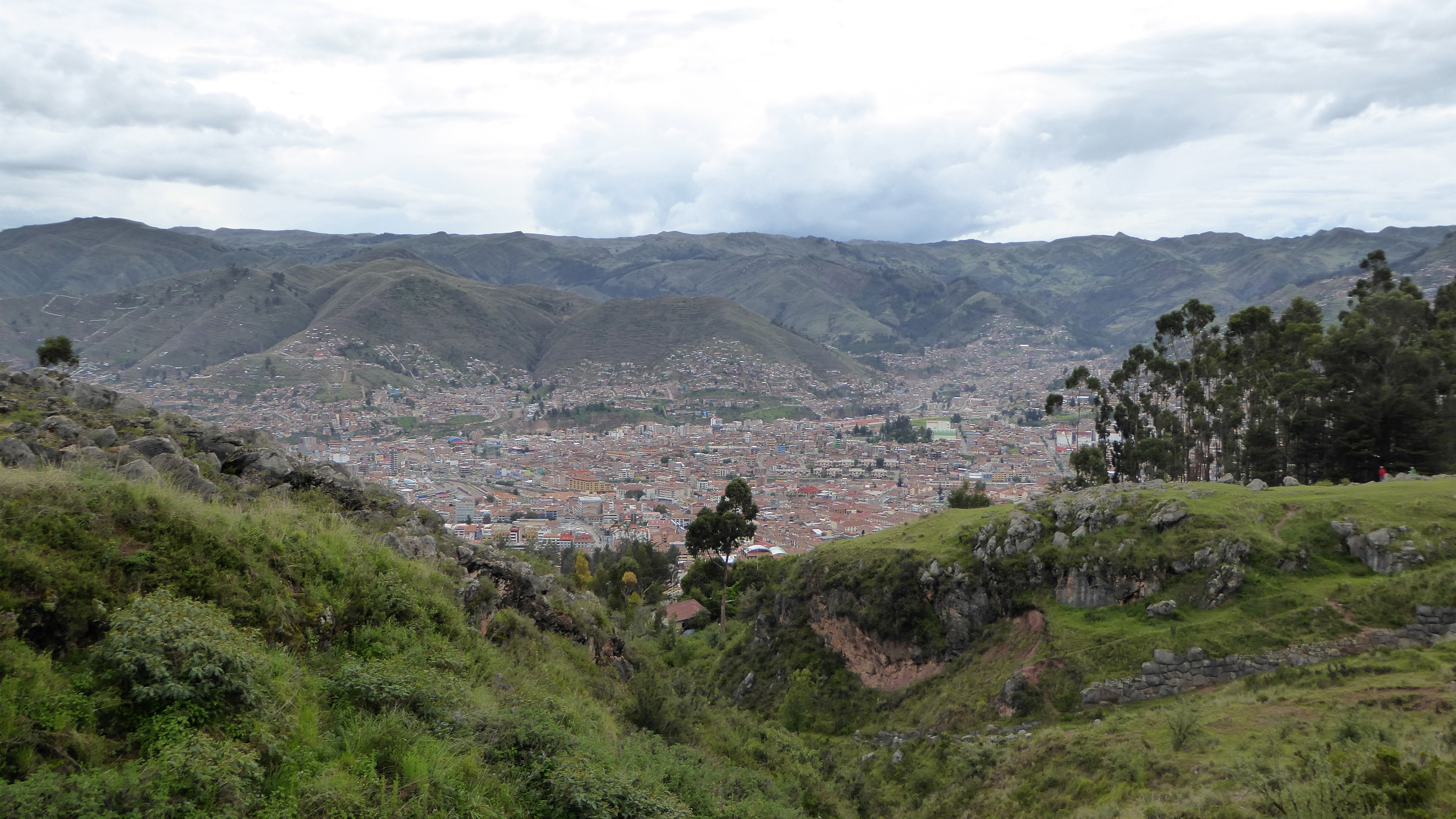 Blick von Q'inqu auf Cusco